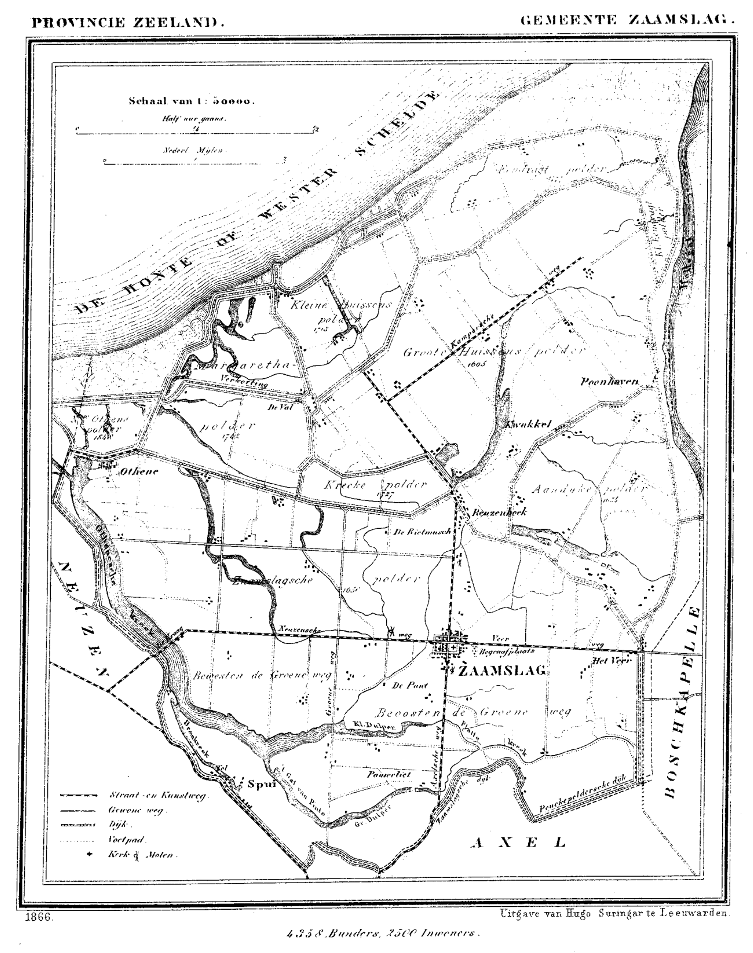 Gemeente Zaamslag, Zeeland, Nederland